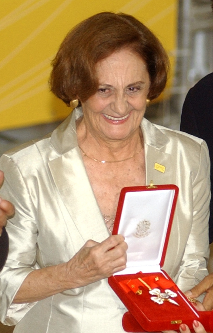 Em Brasília, a primeira-dama Marisa Letícia, o presidente Luiz Inácio Lula da Silva, o ministro da Cultura, Gilberto Gil e a atriz Laura Cardoso, na 12ª edição de entrega da Ordem do Mérito Cultural a personalidades e instituições que se destacaram por sua contribuição à cultura brasileira.